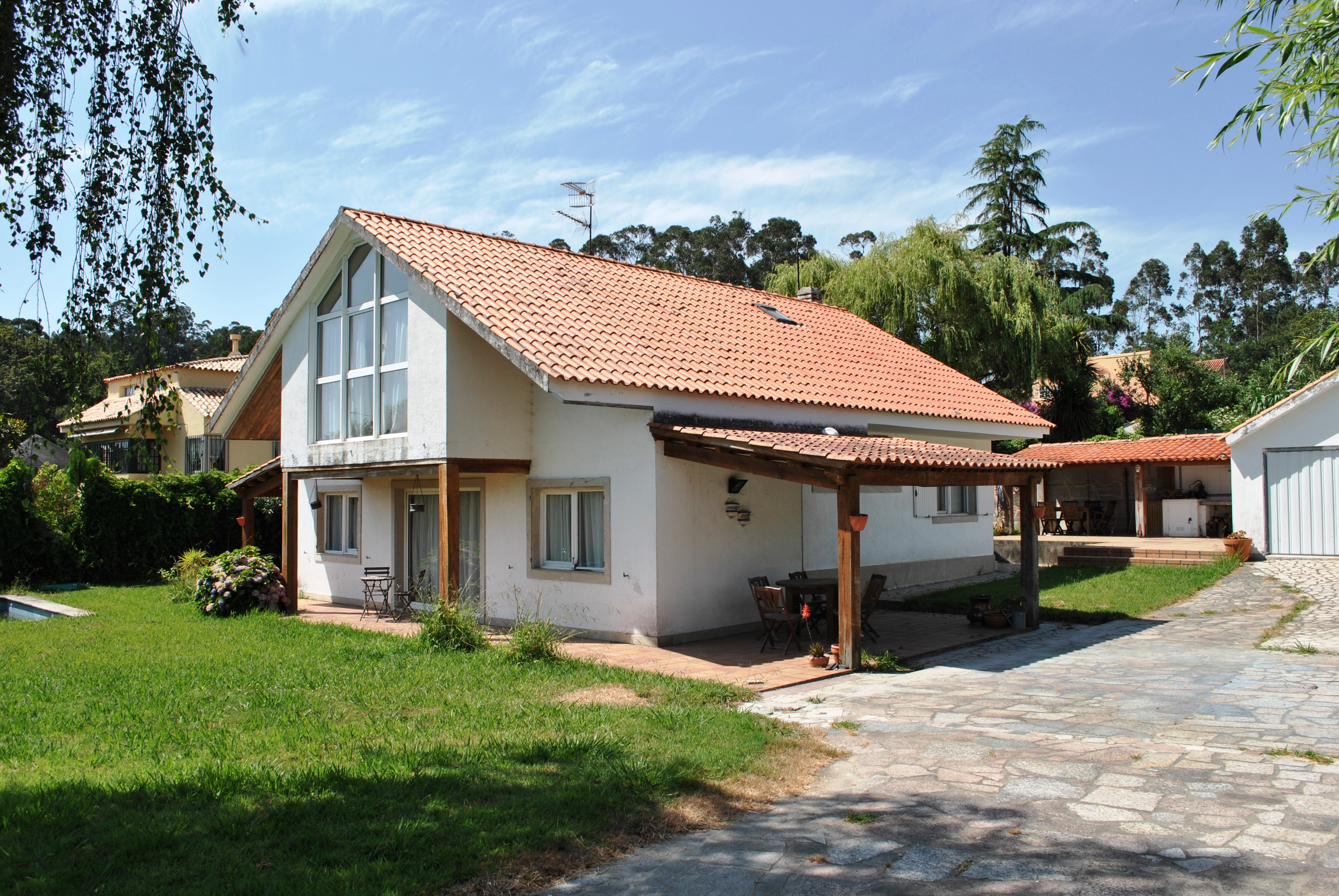 Véxase o título e as categorías